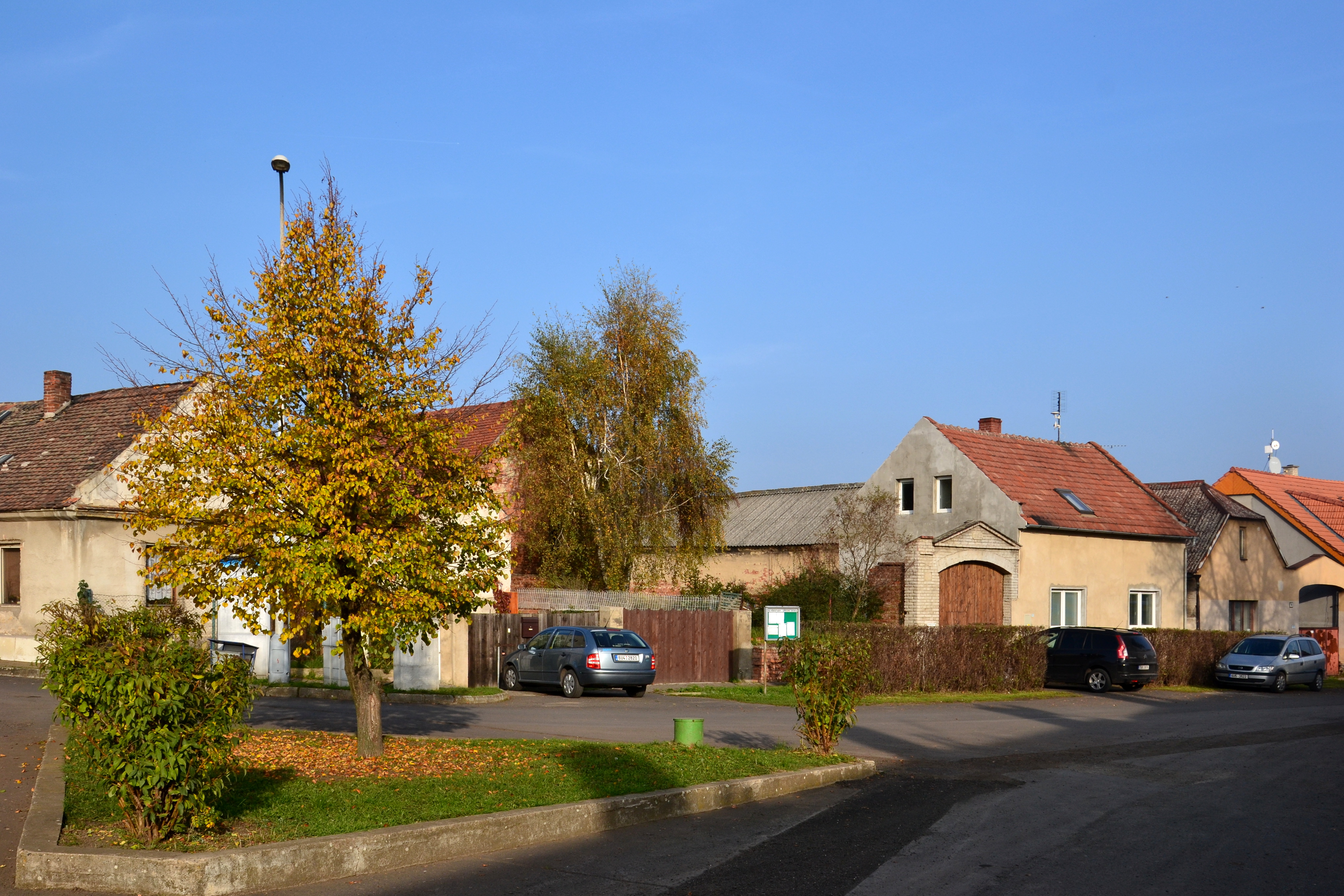 Všestudy - ulice ke kostelu